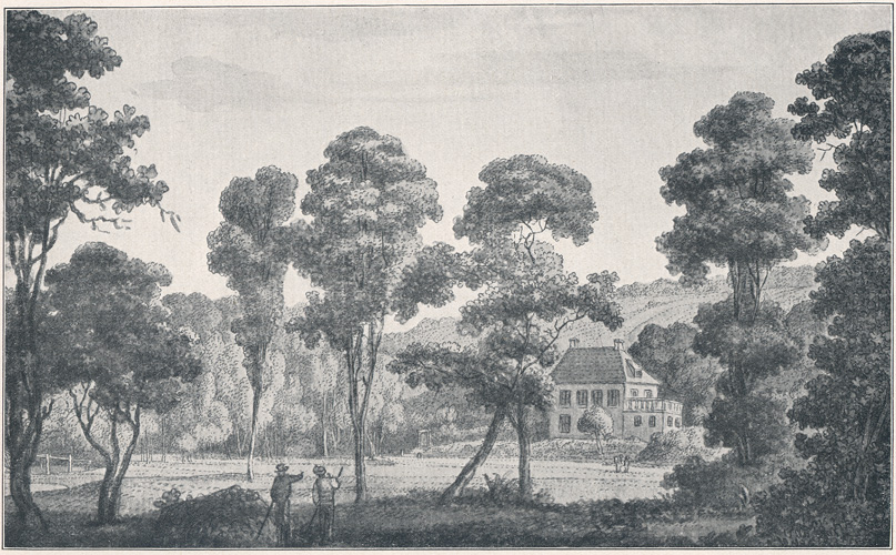 Goethes Gartenhaus in Weimar mit dem 1777 errichteten Altan. Aquarell von Georg Melchior Kraus (1733-1806). Abbildung in Hans Wahl: Goethes Gartenhaus. Leipzig: J. J. Weber o.J. (vor 1945).